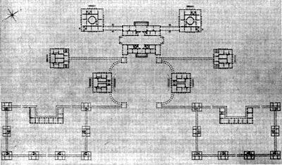 И. Старов. План Пеллинского дворца. 1784—1789